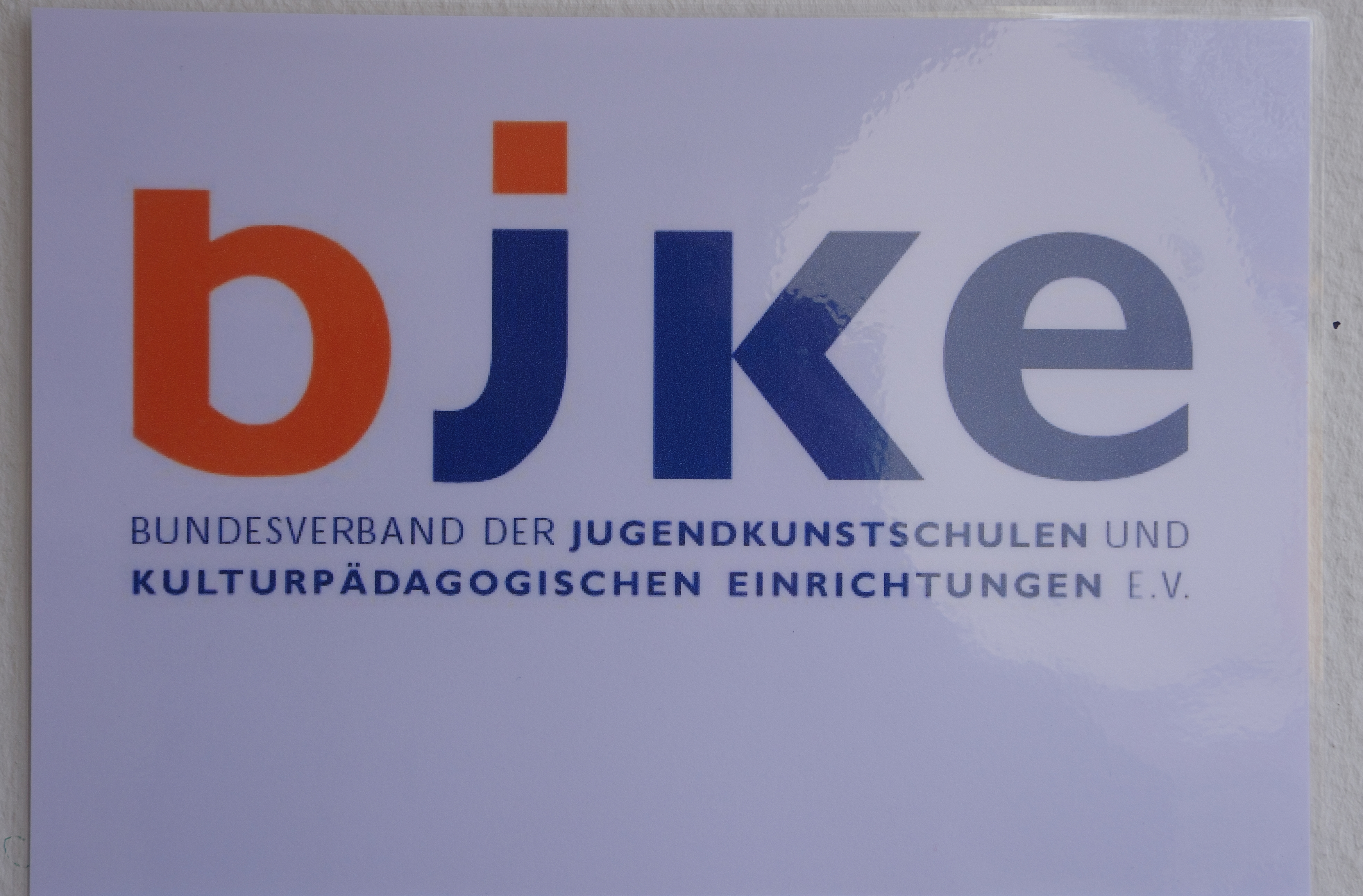 Schild BUNDESVERBAND DER JUGENDKUNSTSCHULEN UND KULTURPÄDAGOGISCHEN EINRICHTUNGEN E.V. (BJKE), Kurpark 5, 59425 Unna